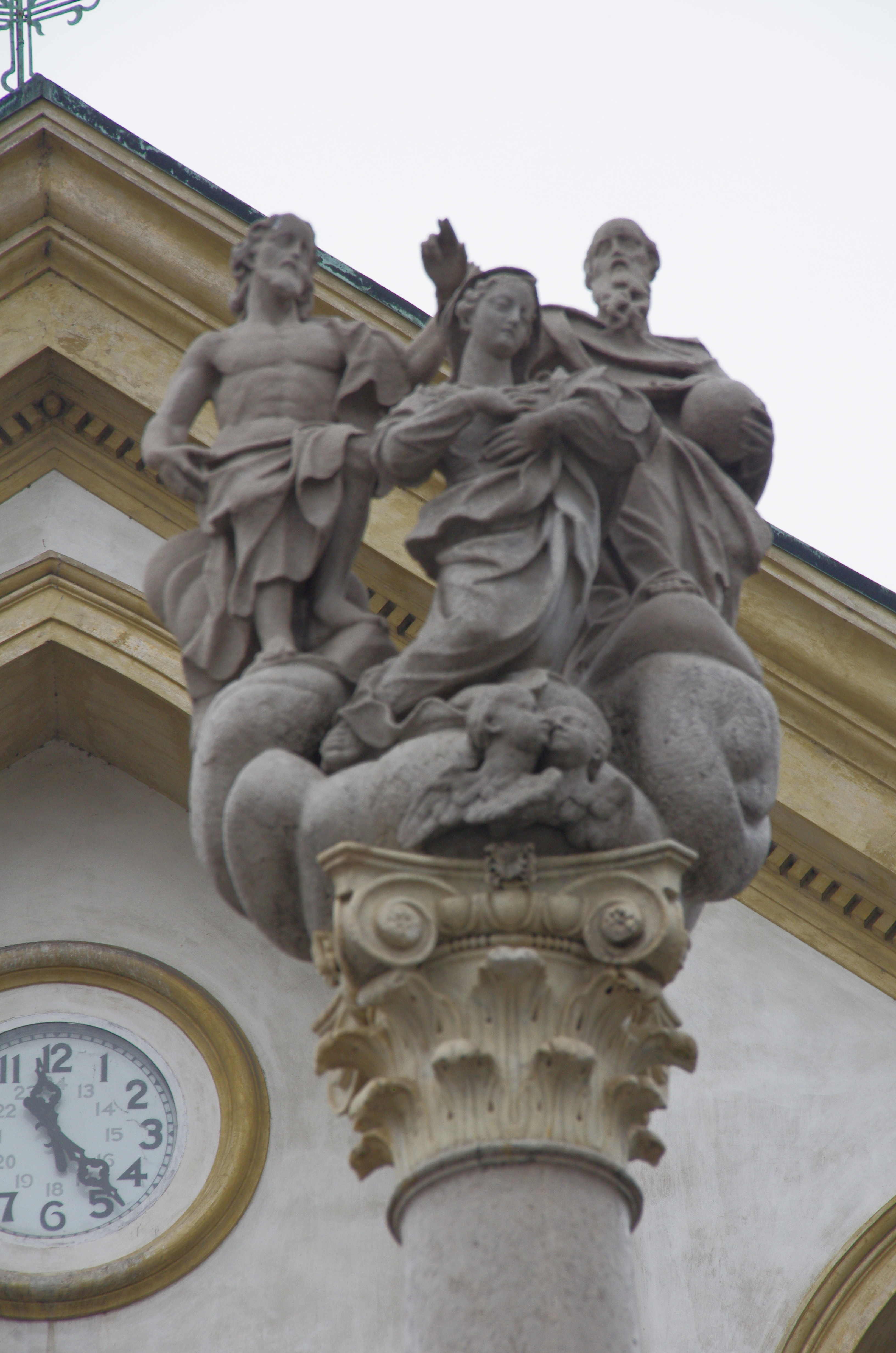 2.4.13 Ljubljana 21